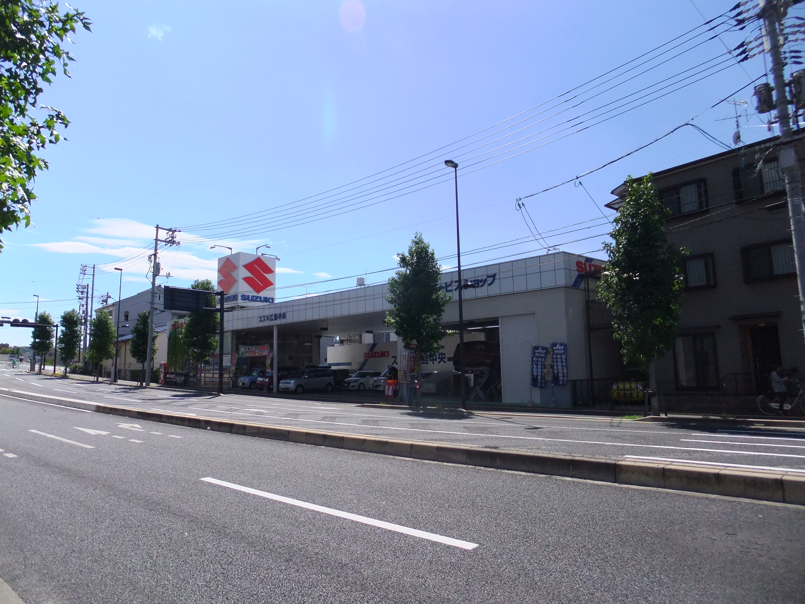 大須口駅跡